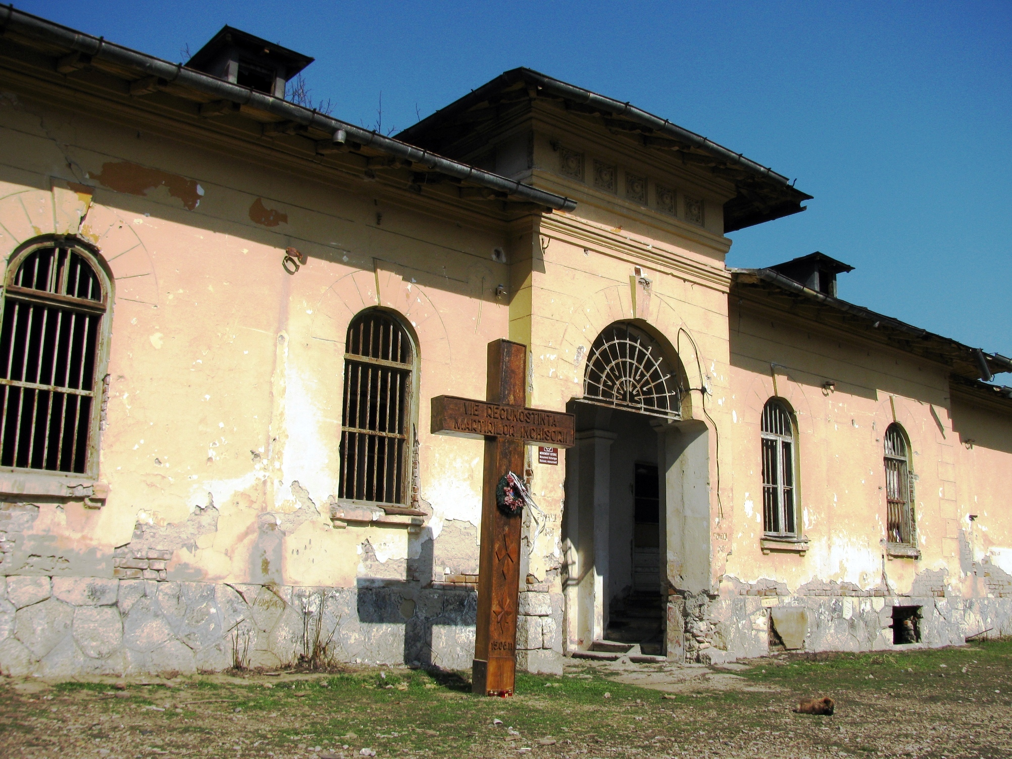 Inchisoarea de la Rm. Sarat sau "Puscaria izolarii totale" a fost una dintre cele mai dure temnita din Romania, sub regimul comunist. Aici au murit peste 90% dintre detinutii politici. Aici au fost inchisi, printre altii, Ion Mihalache, Corneliu Coposu, Ion Diaconescu... Temnita comunista a functionat intre 1945 - 1963, cand a fost transformata in depozit.